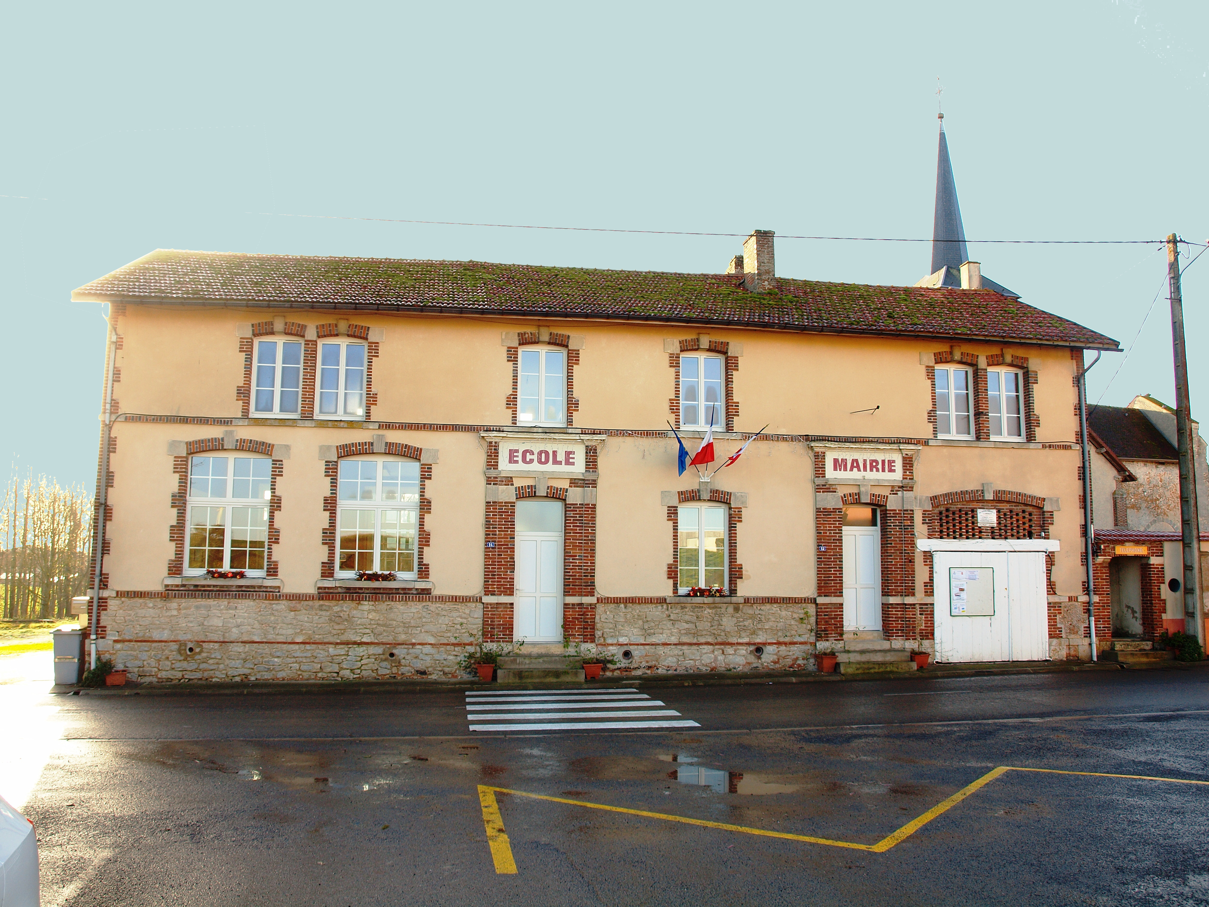 Clamanges (Marne, France)